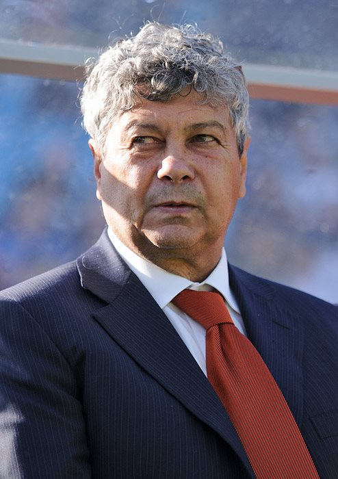 Динамо - Шахтер